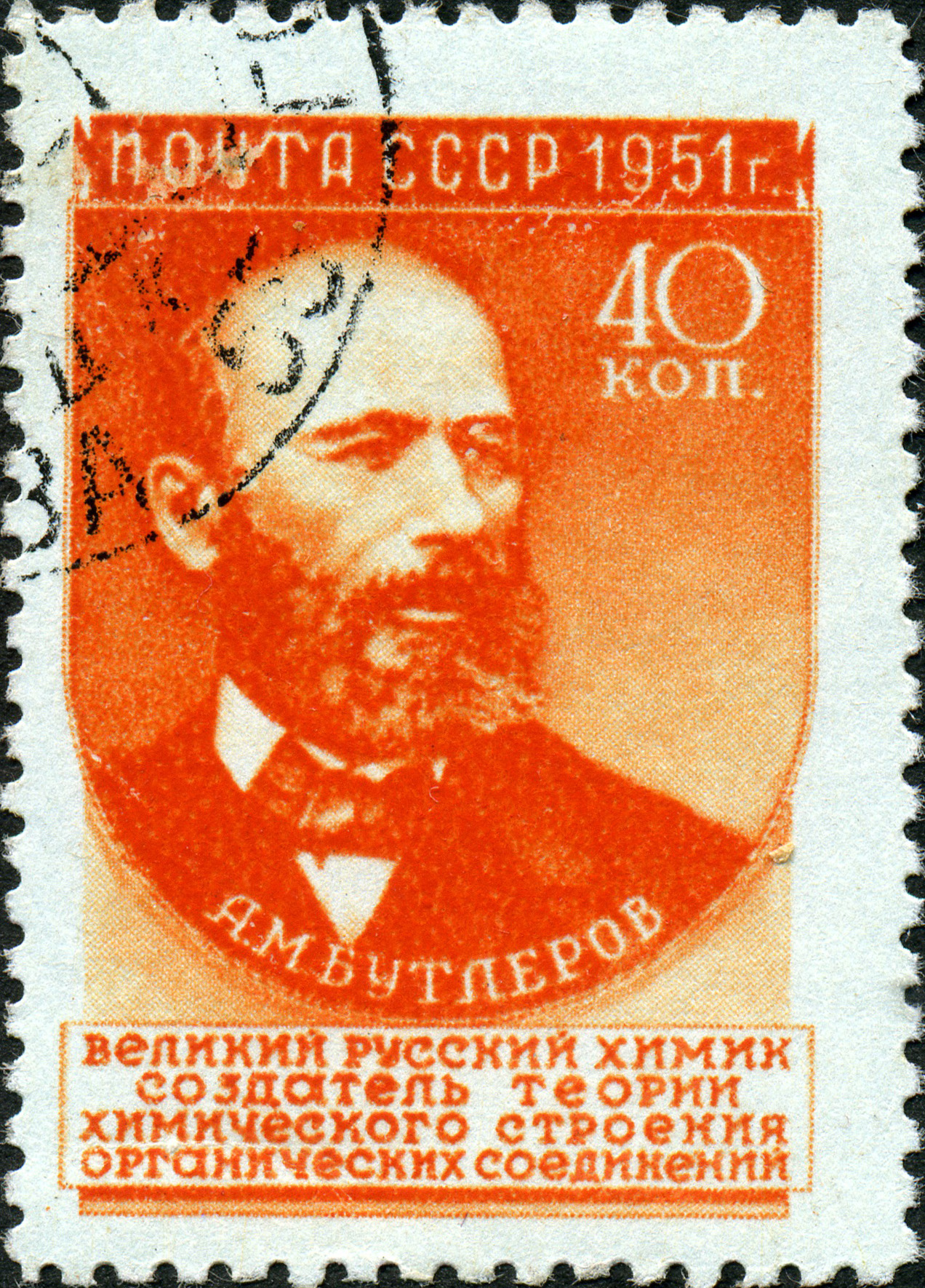 Марка СССР